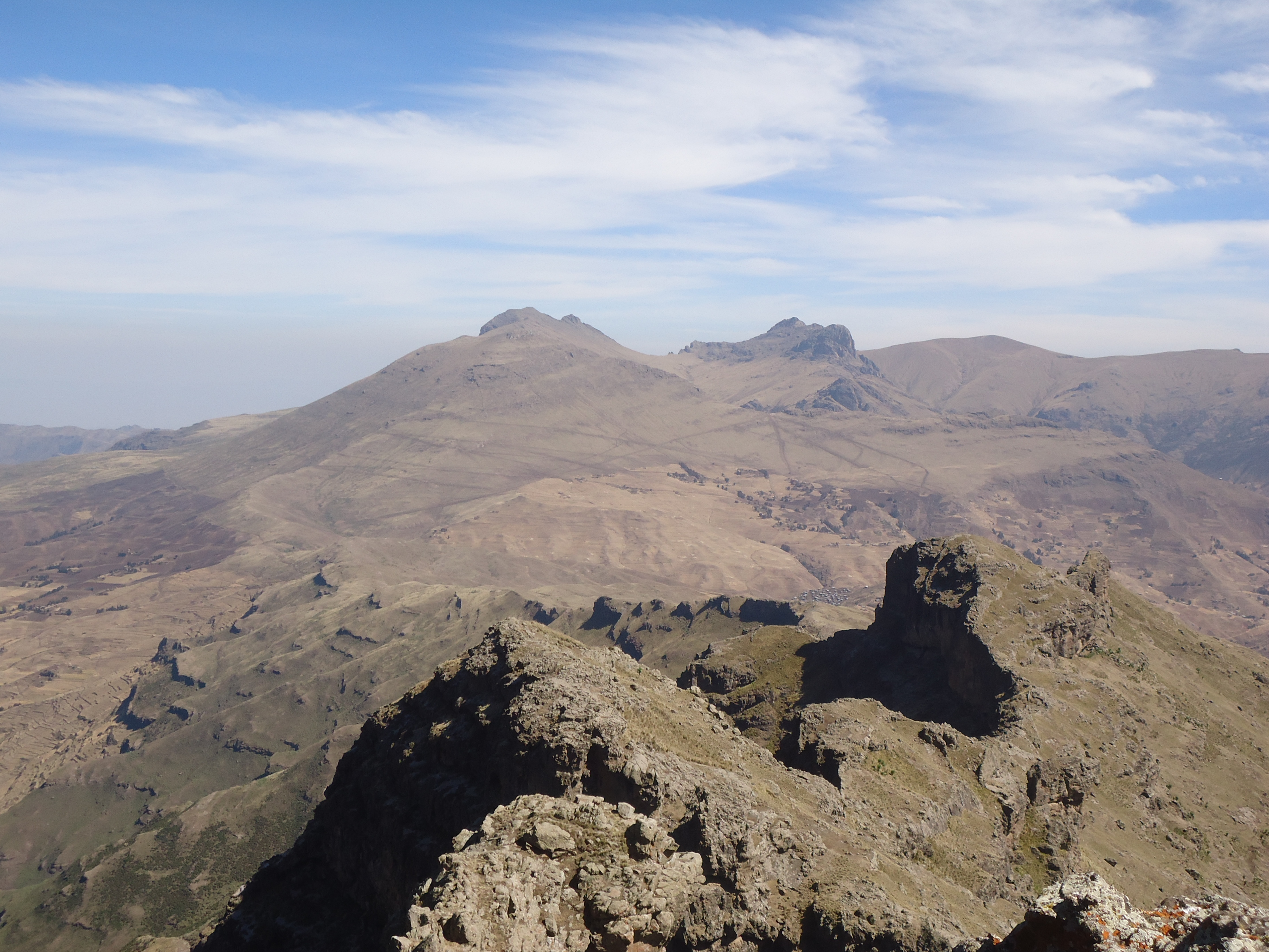 Blick vom Bwahit-Pass (4.200m) auf den Kidis Yared (4.453m)